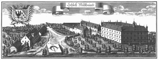 Schloss Muehlheim von 1721